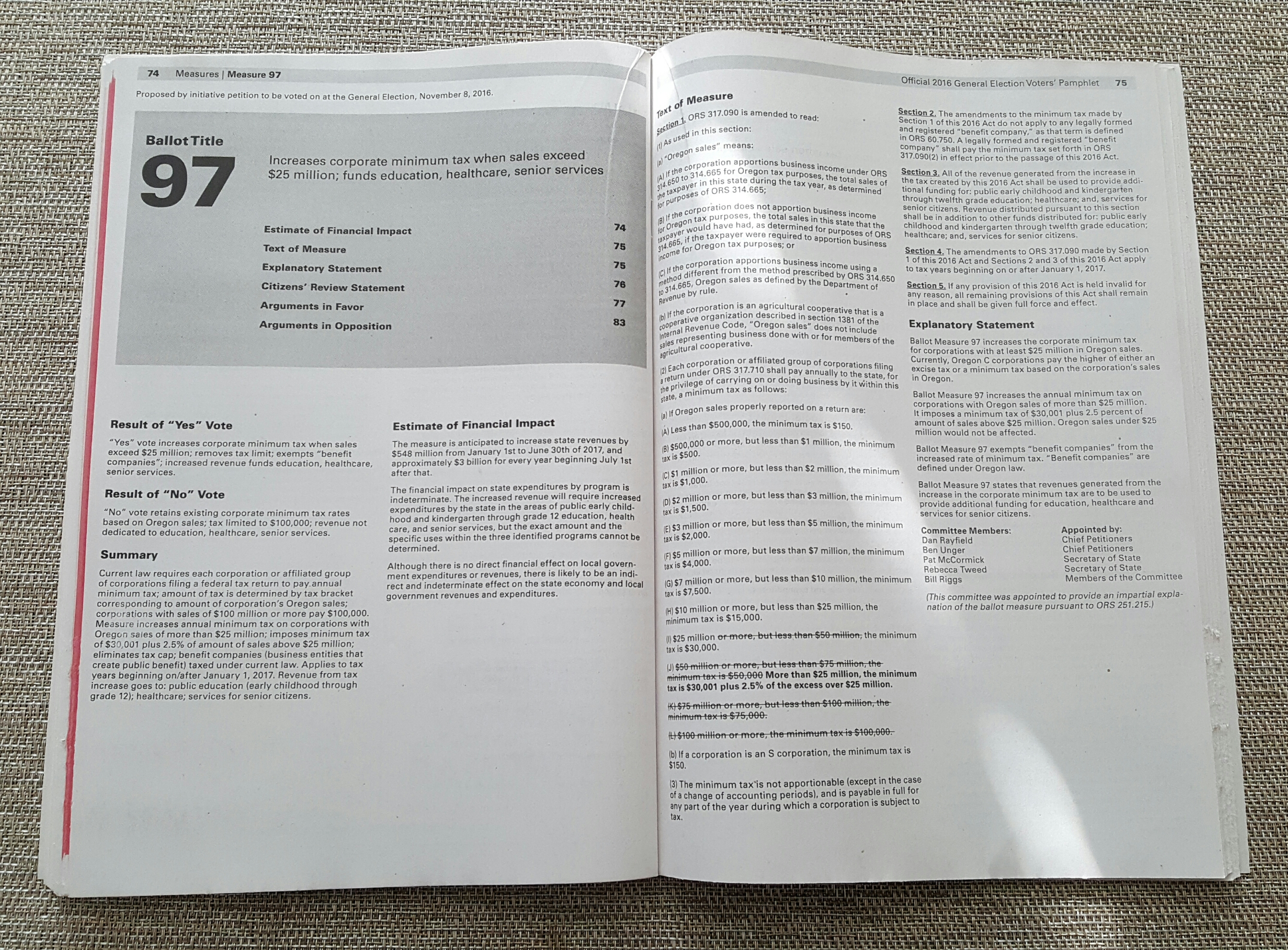 Measure 97